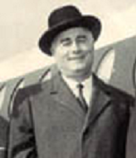 Luciano Jona, sindaco di Torino - immagine ridimensionata digitalmente